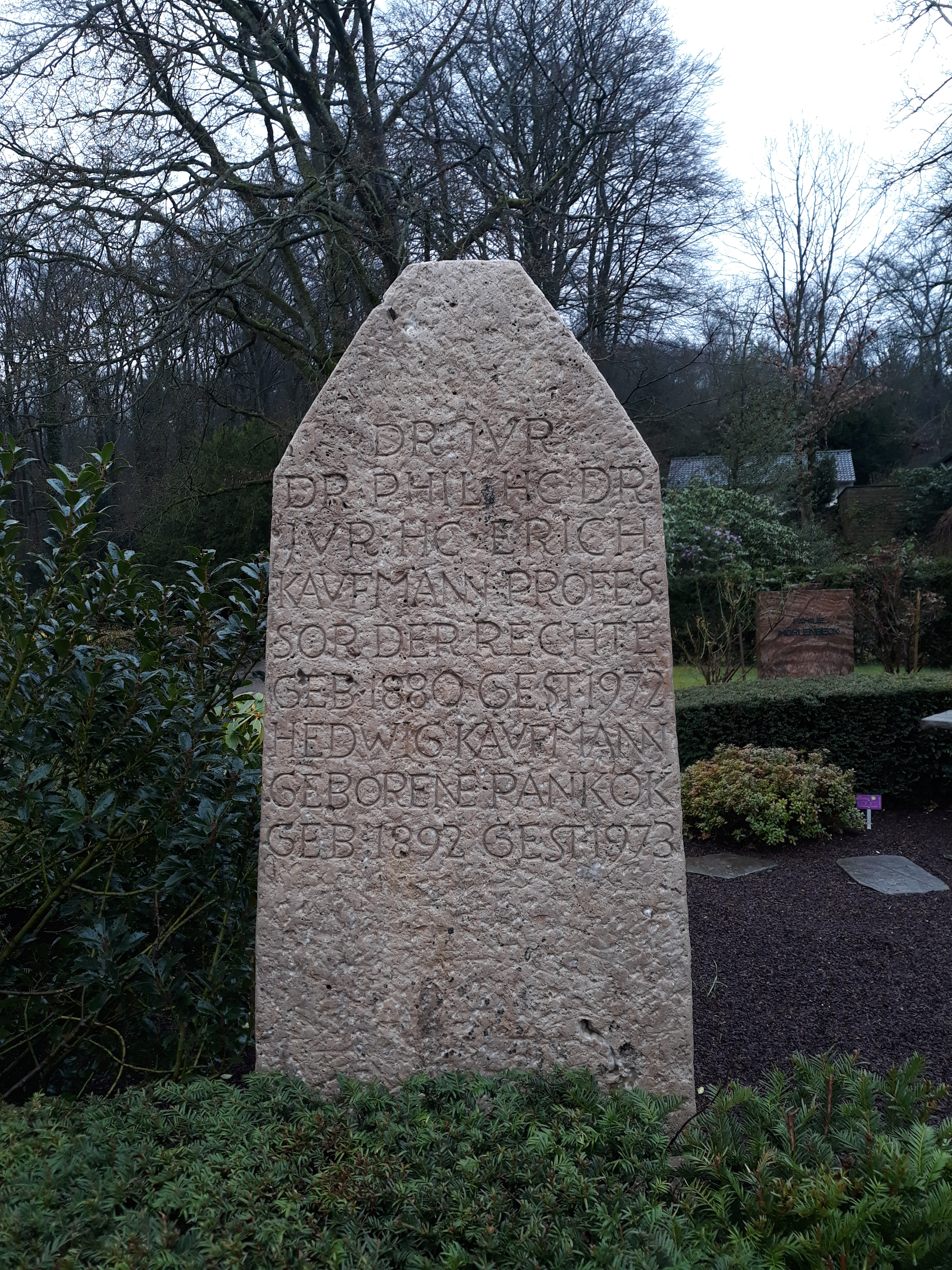 Das Grab des deutschen Juristen Erich Kaufmann und seiner Ehefrau Hedwig im Familiengrab Pankok auf dem Friedhof Auberg in Mülheim an der Ruhr-Saarn.